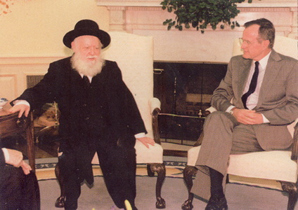 הנשיא בוש יחד עם הרב שפירא